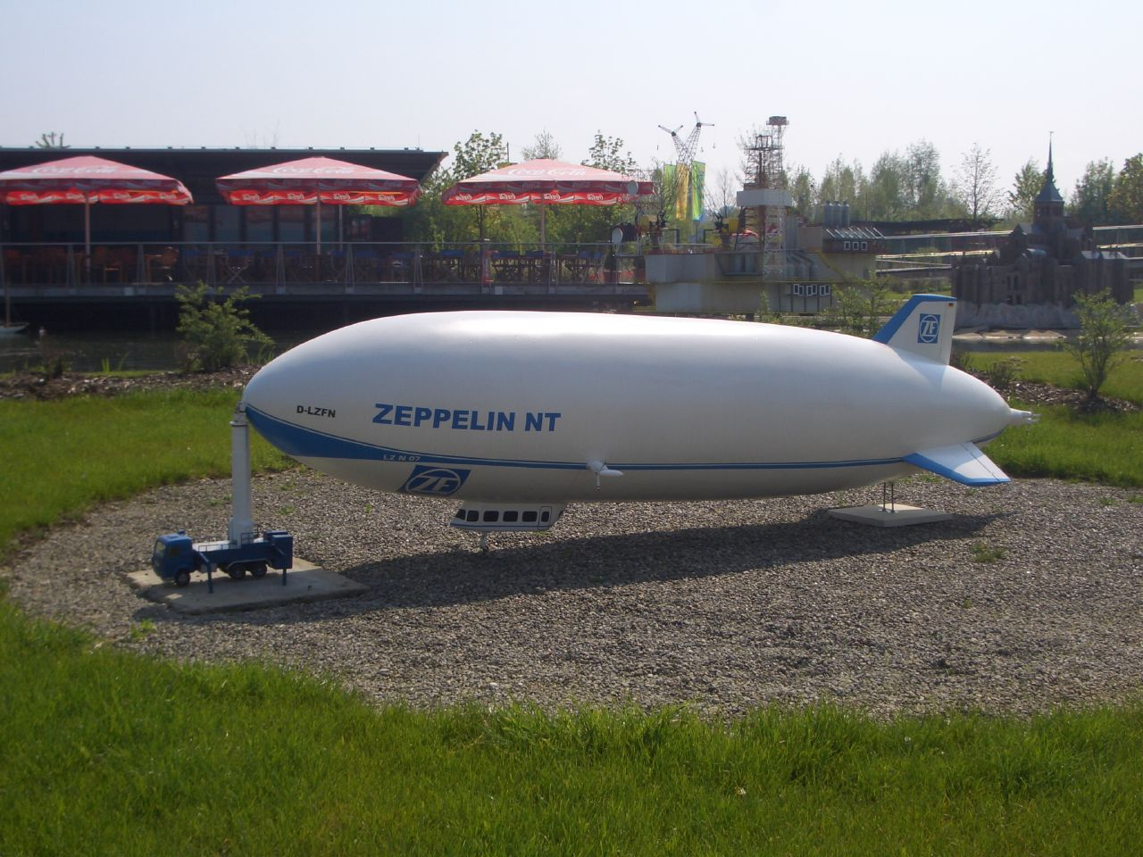 Modell des Zeppelin NT im Mini Mundus Bodensee